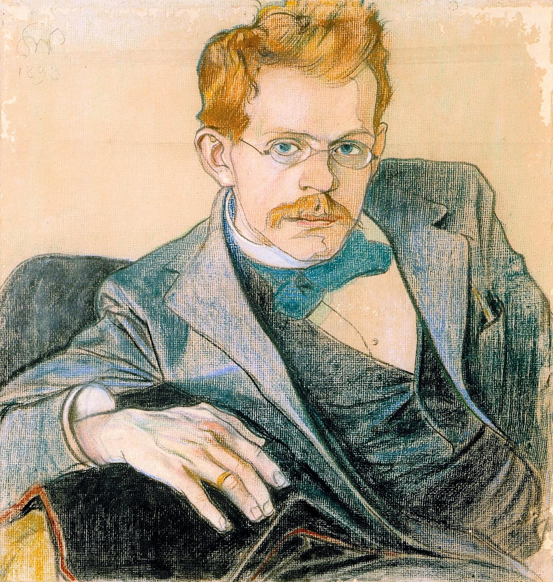 Portret Józefa Mehoffera, pastel, 60 x 57 cm, Fundacja Raczyńskich przy Muzeum Narodowym w Poznaniu